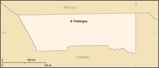 Description:Carte du Bantoustan de l'Ovamboland Auteur:Rémih